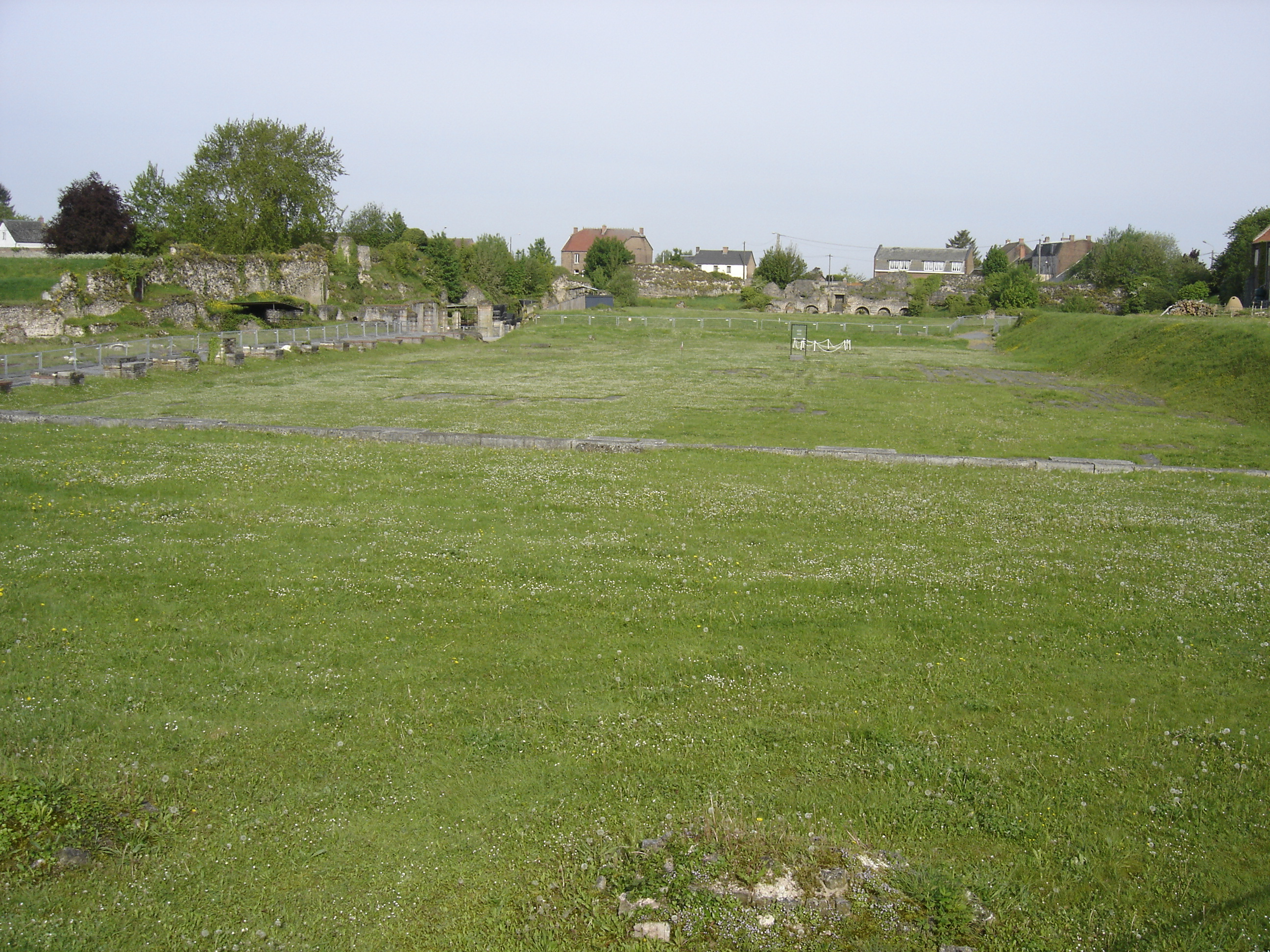 Bavay Ruines du forum gallo-romain